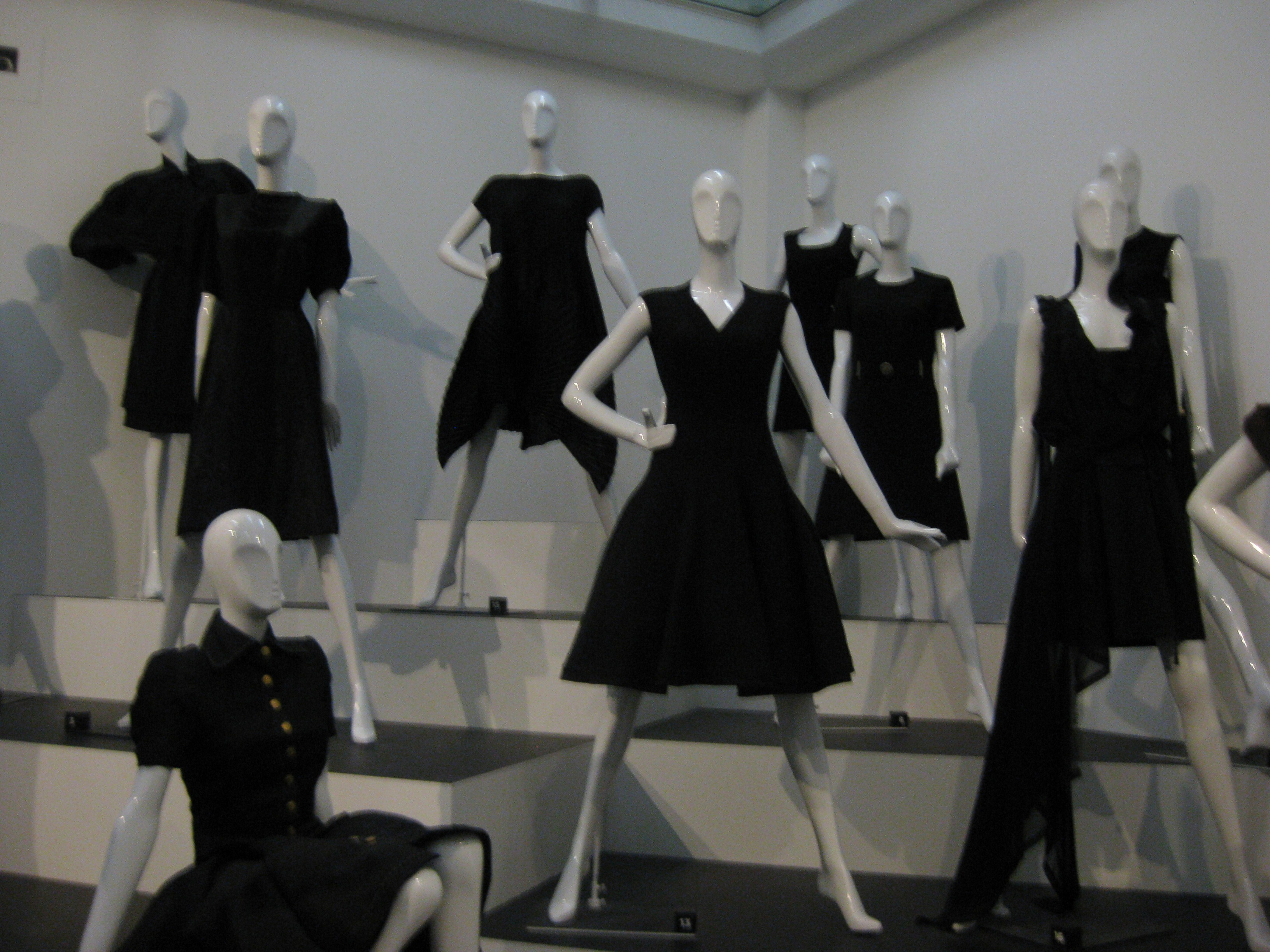 Variaties op het kleine zwarte jurkje van Chanel tijdens de tentoonstelling Chanel:De Legende in het Gemeentemuseum Den Haag.